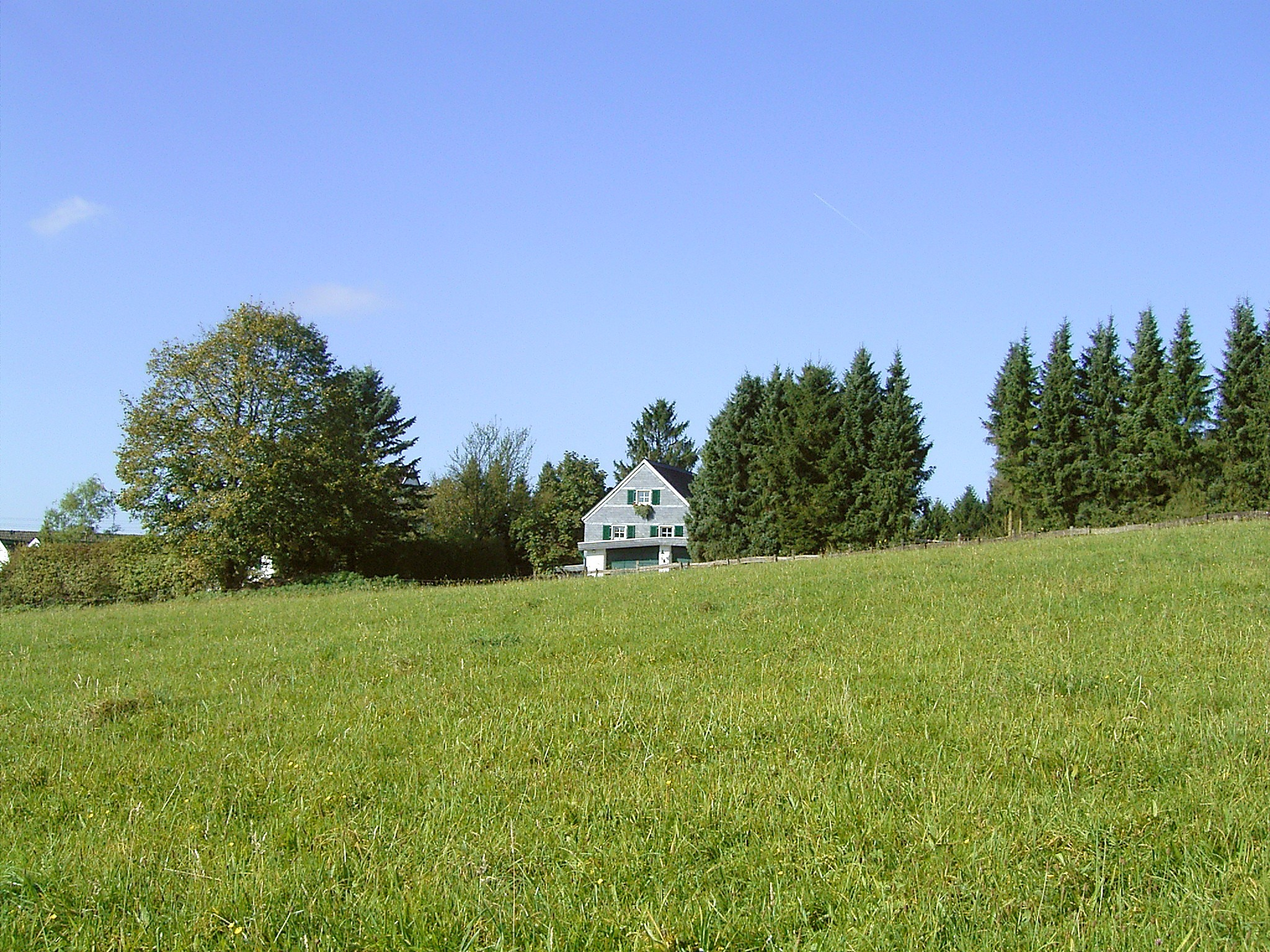 Radevormwald